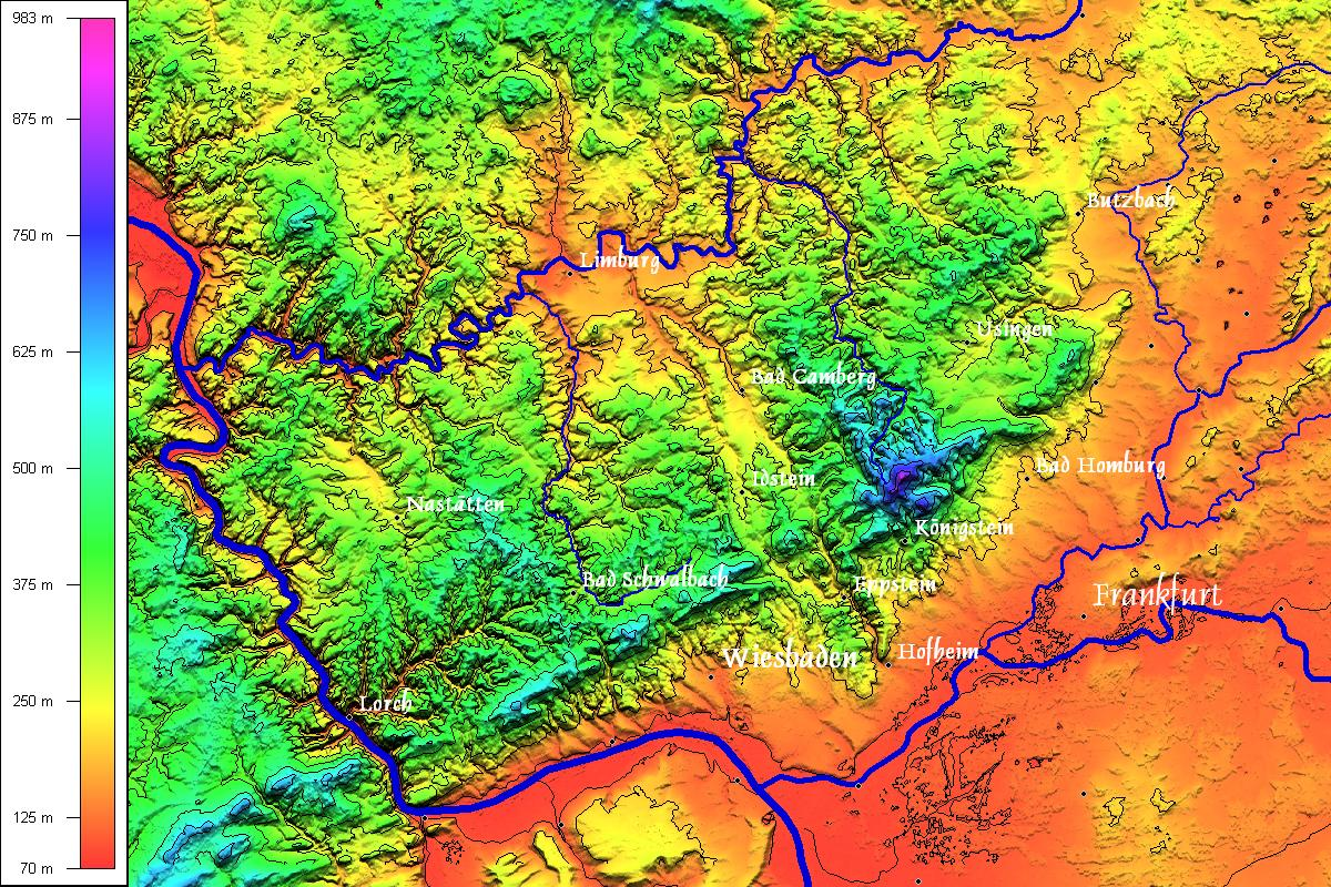 Relief des Taunus in geschummerter Farbhöhenstufung; basiert auf SRTM-Höhendaten (3')